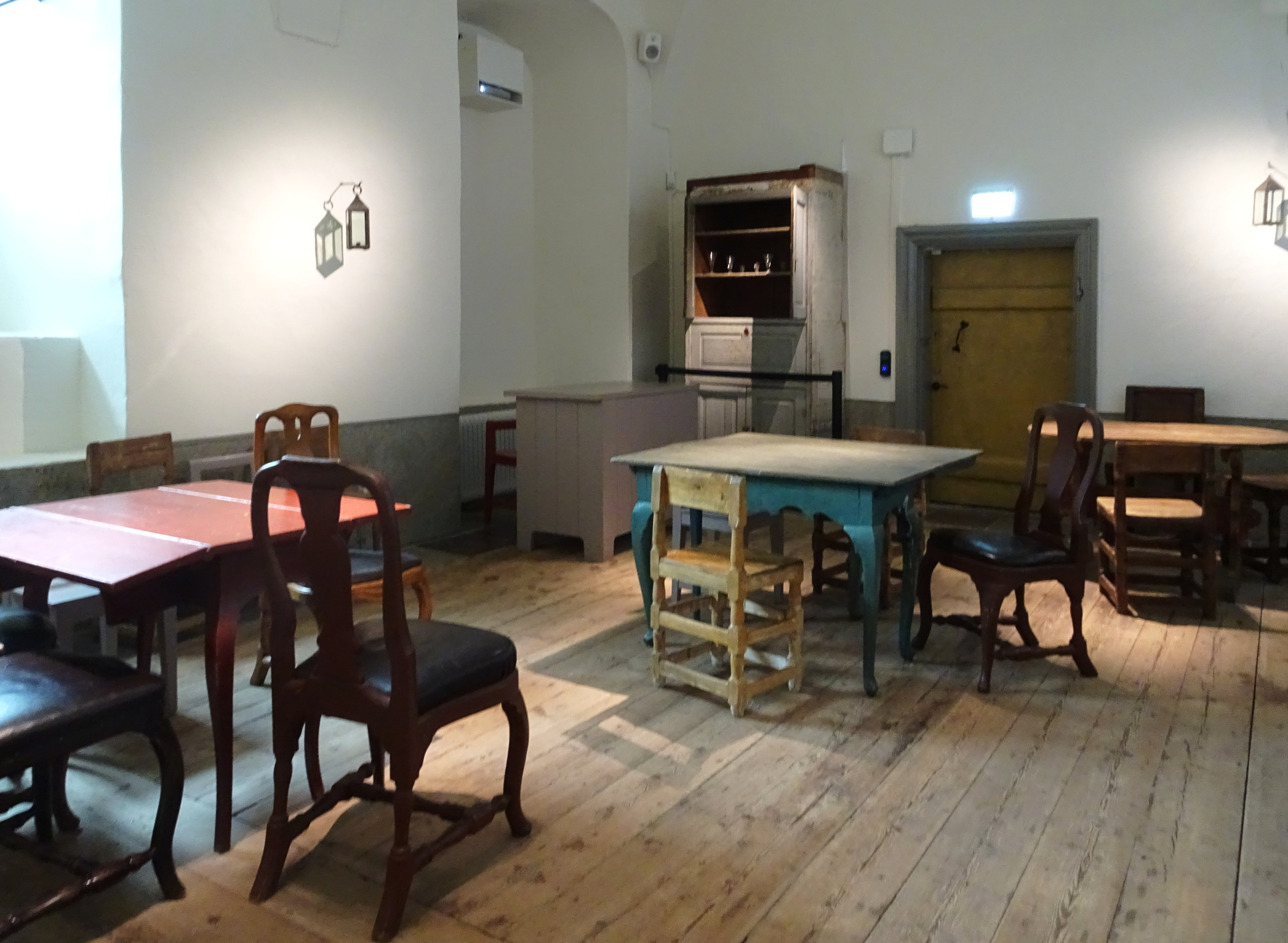 Södra stadshuskällaren (rekonstruktion) i Stockholms satdsmuseum